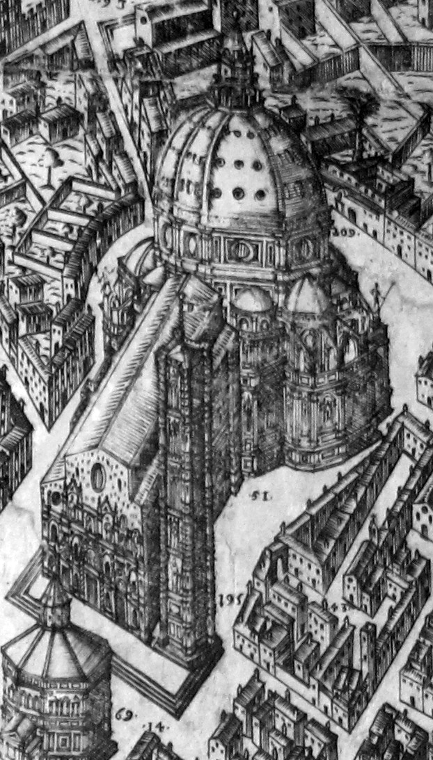 Pianta del buonsignori, dettaglio 051 duomo